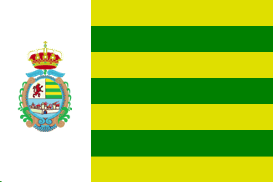 Bandera Municipal de Villaseca de la Sagra (Toledo)